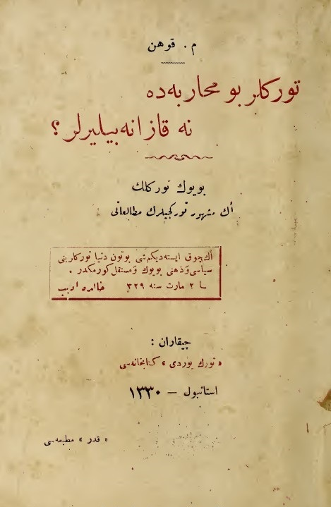 Türkler Bu Muharebede Ne Kazanabilirler? Moiz Kohen (Munis Tekinalp)